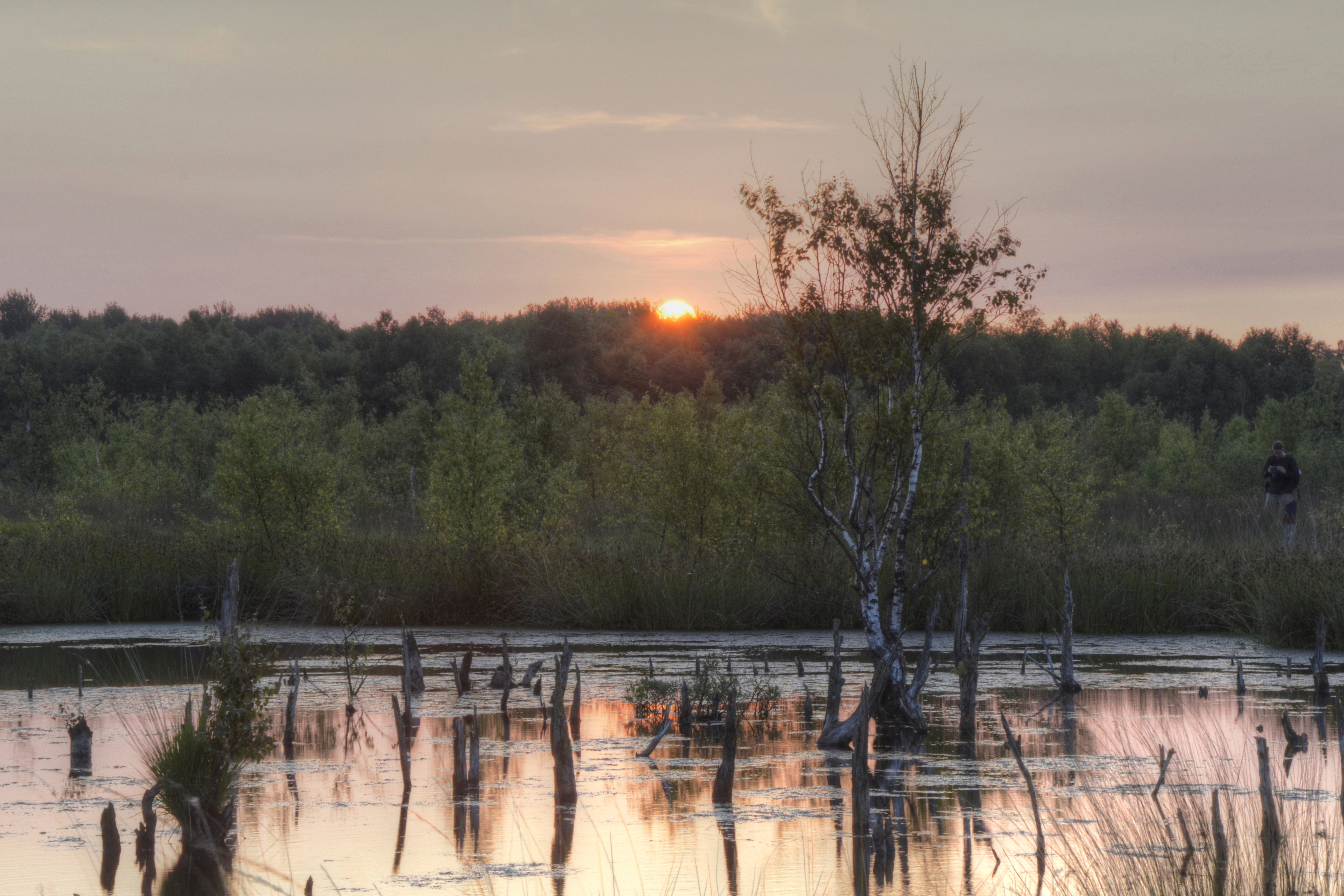 Sunset Bargerveen